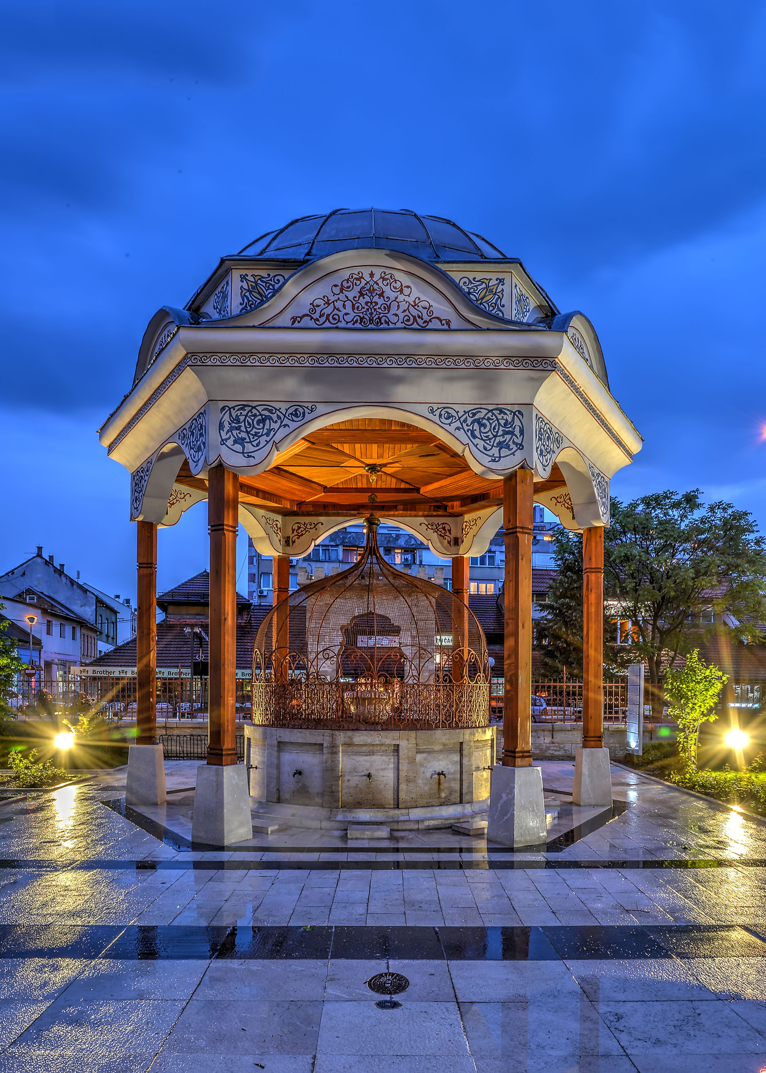 Undetermined language : Obnovljeni šadrvan ispred Ferhadija džamije u Banja Luci